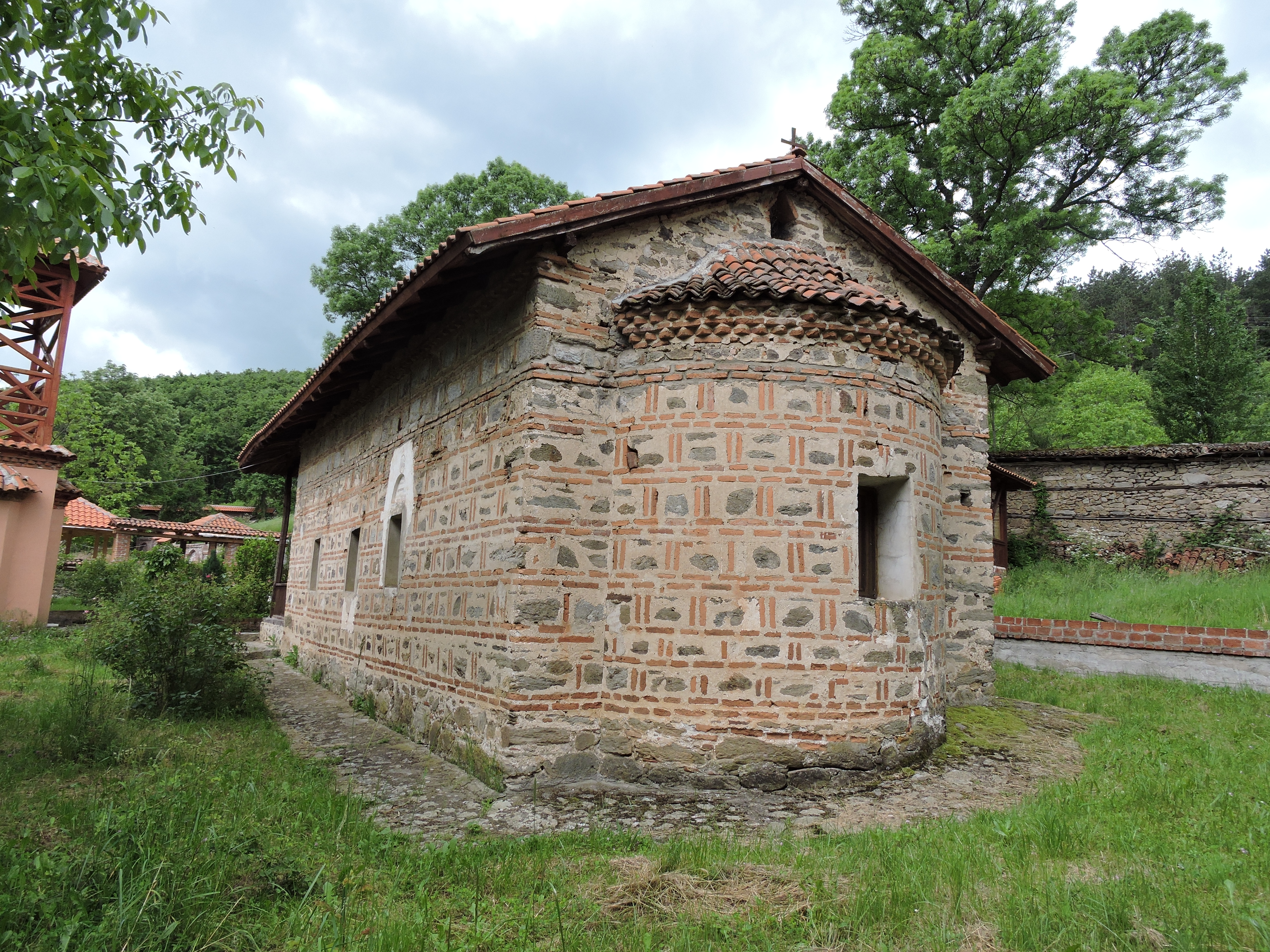 Природни простор око непокретног културног добра Јашуњски манастири Свети Јован и Света Богородица МПС33